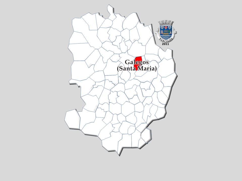 Censos 1964/2011